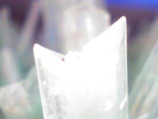 石膏の双晶